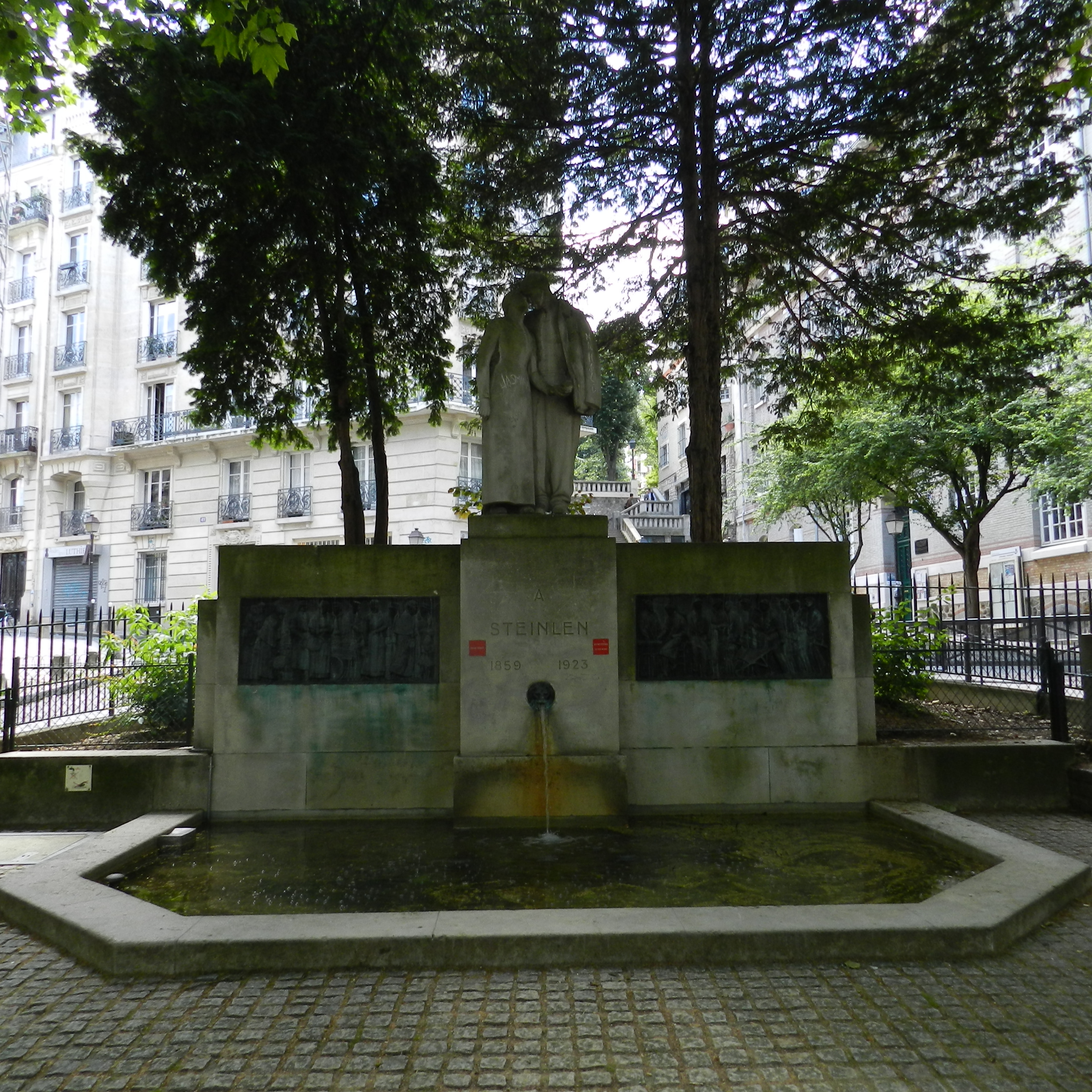 Monument à la mémoire de Théophile Alexandre Steinlen (1859-1923), dit aussi Fontaine Steinlen, installé en 1936, Square Joël-Le-Tac (square inauguré en février 2012, précédemment square de la place Constantin-Pecqueur), XVIIIe arrondissement, Paris, France.